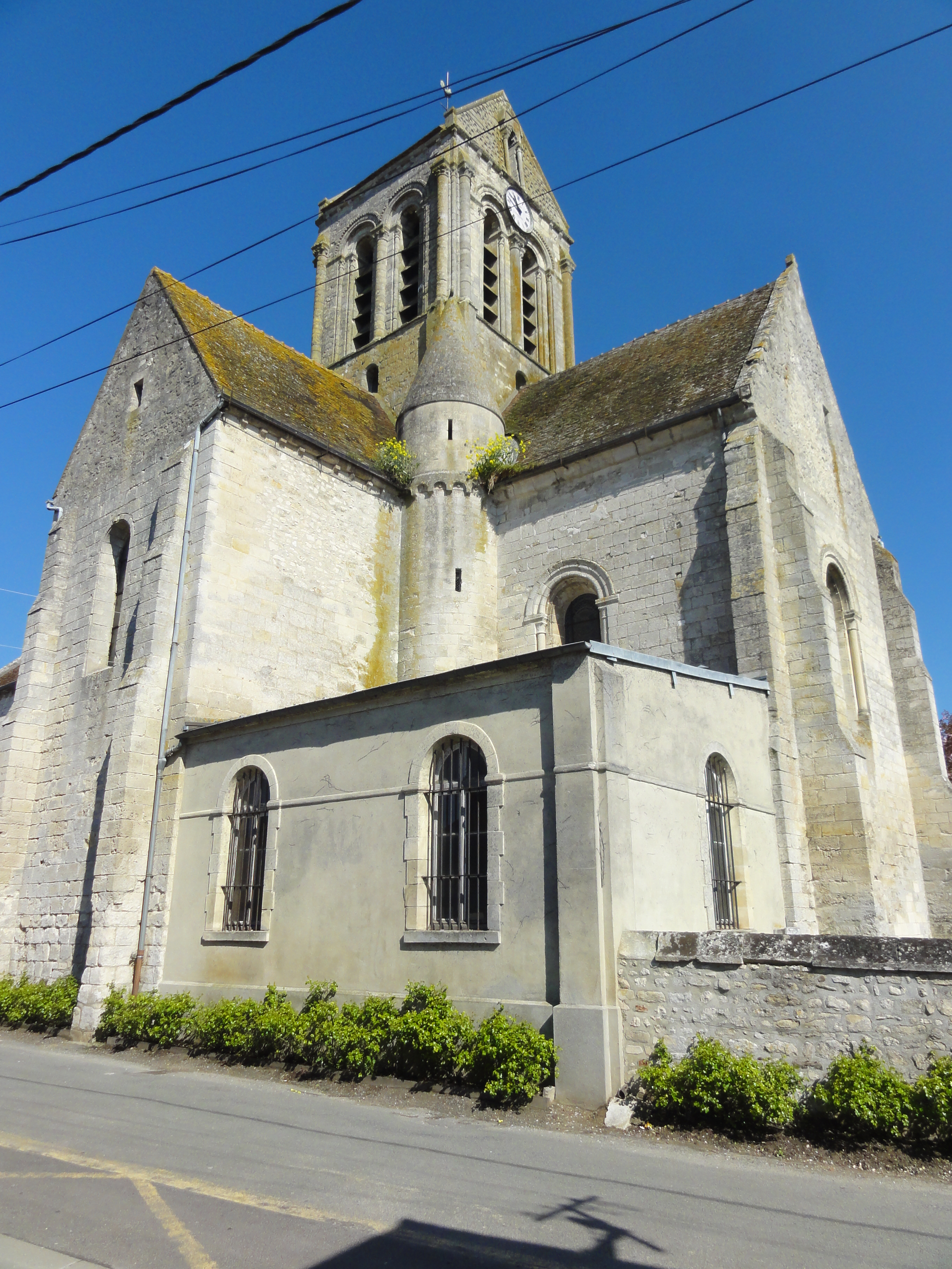 Église Notre-Dame-de-la-Nativité de Lavilletertre - voir titre.